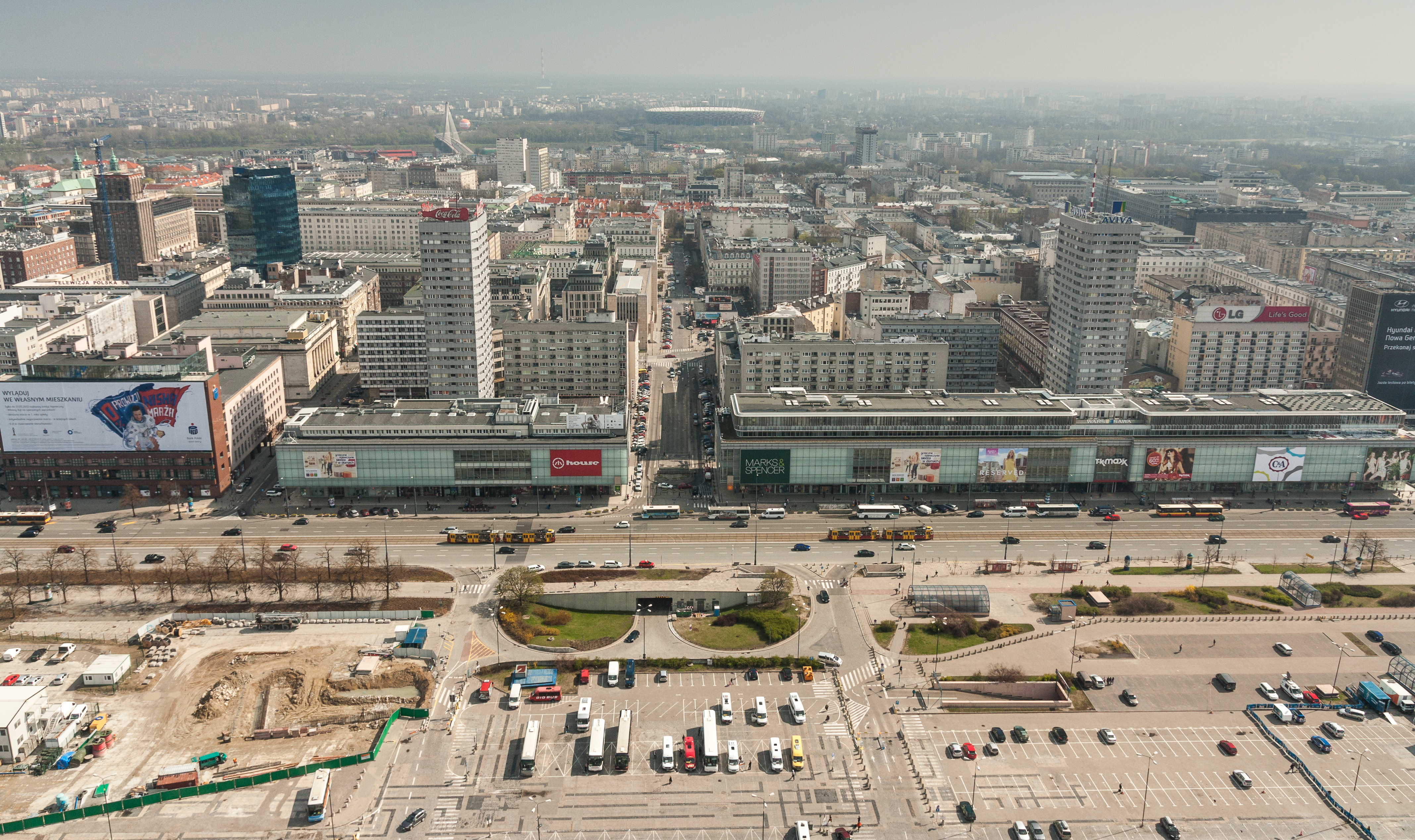 Ściana Wschodnia w Warszawie, w tle Stadion Narodowy z Pałacu Kultury